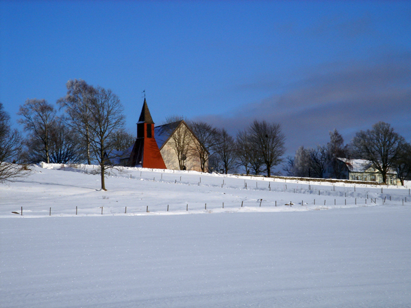 Naverstads kyrka (medeltid), Tanums kommun, Västra Götalands län, Sweden